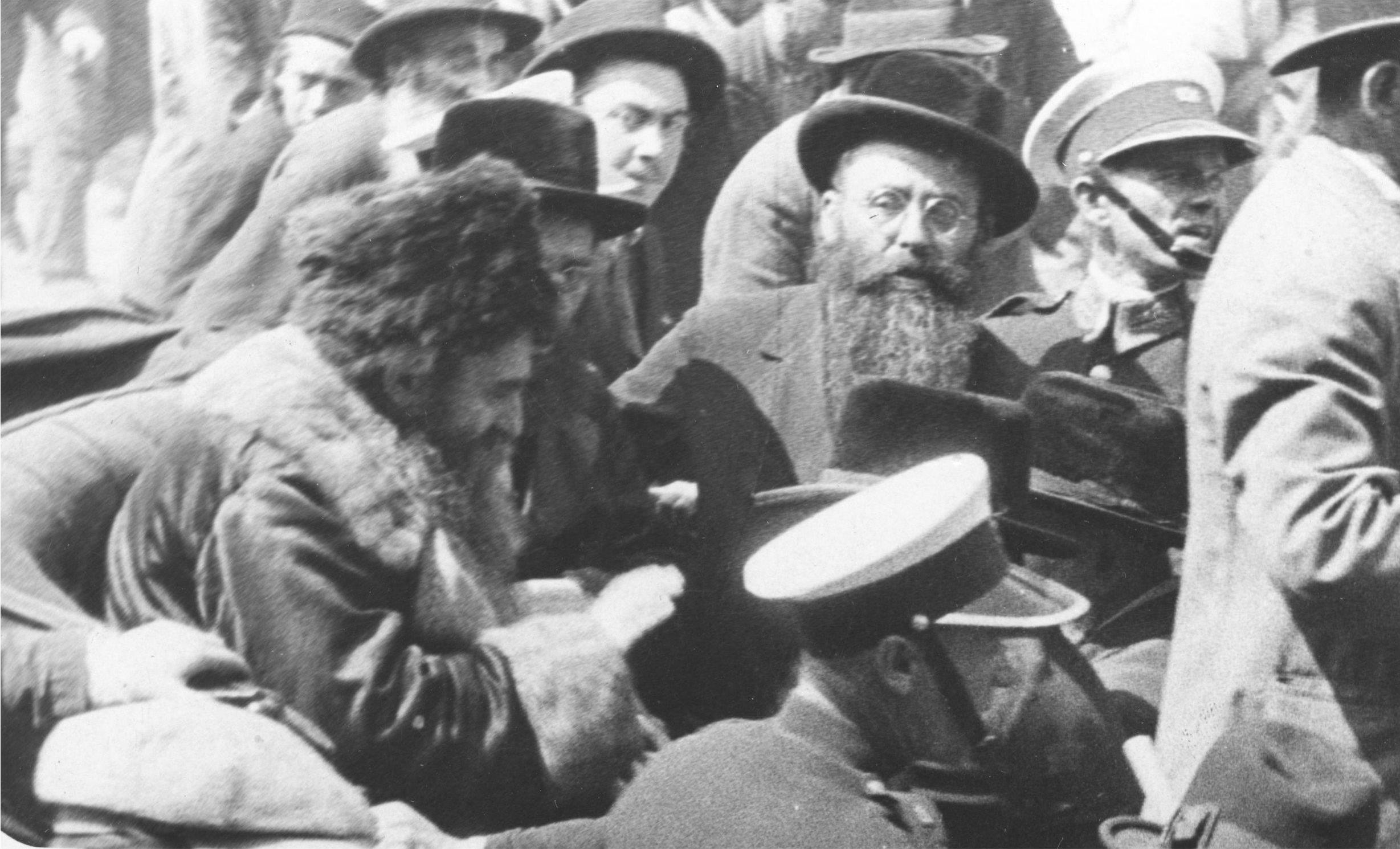 Глава белзских хасидов ребе Аарон Роках во время своего визита в Дрогобыче.